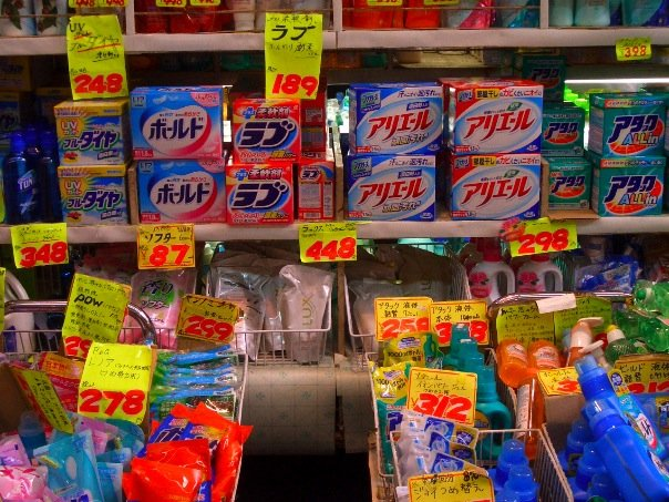 Marchnad Kuromon ("Gat Ddu") ger Nippombashi, De Osaka, Japan. Tynnwyd yn Haf 2007.